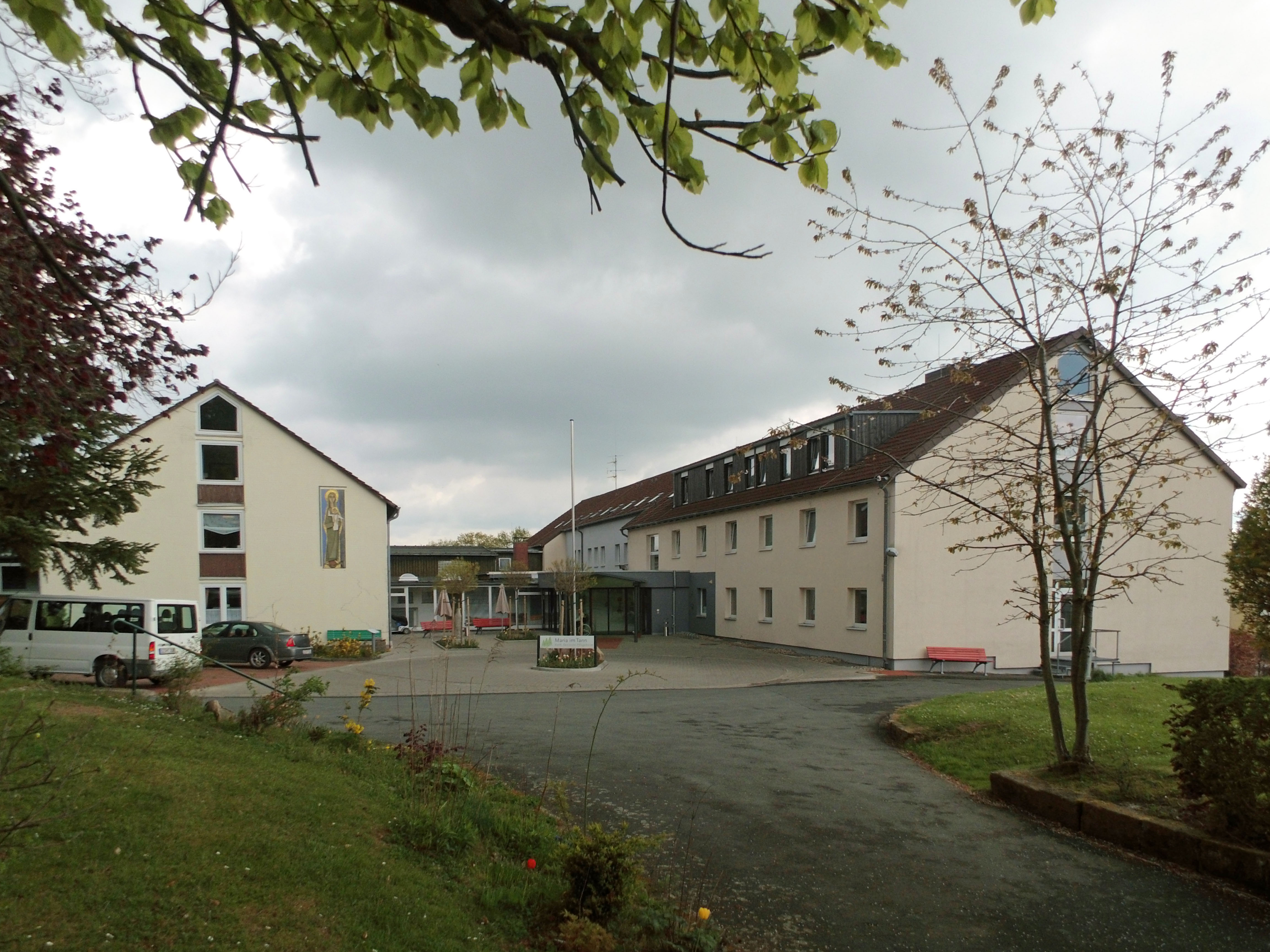 Römisch-katholisches Altenheim "Maria im Tann" an der St.-Gabriel-Kirche in Salzgitter-Gebhardshagen.